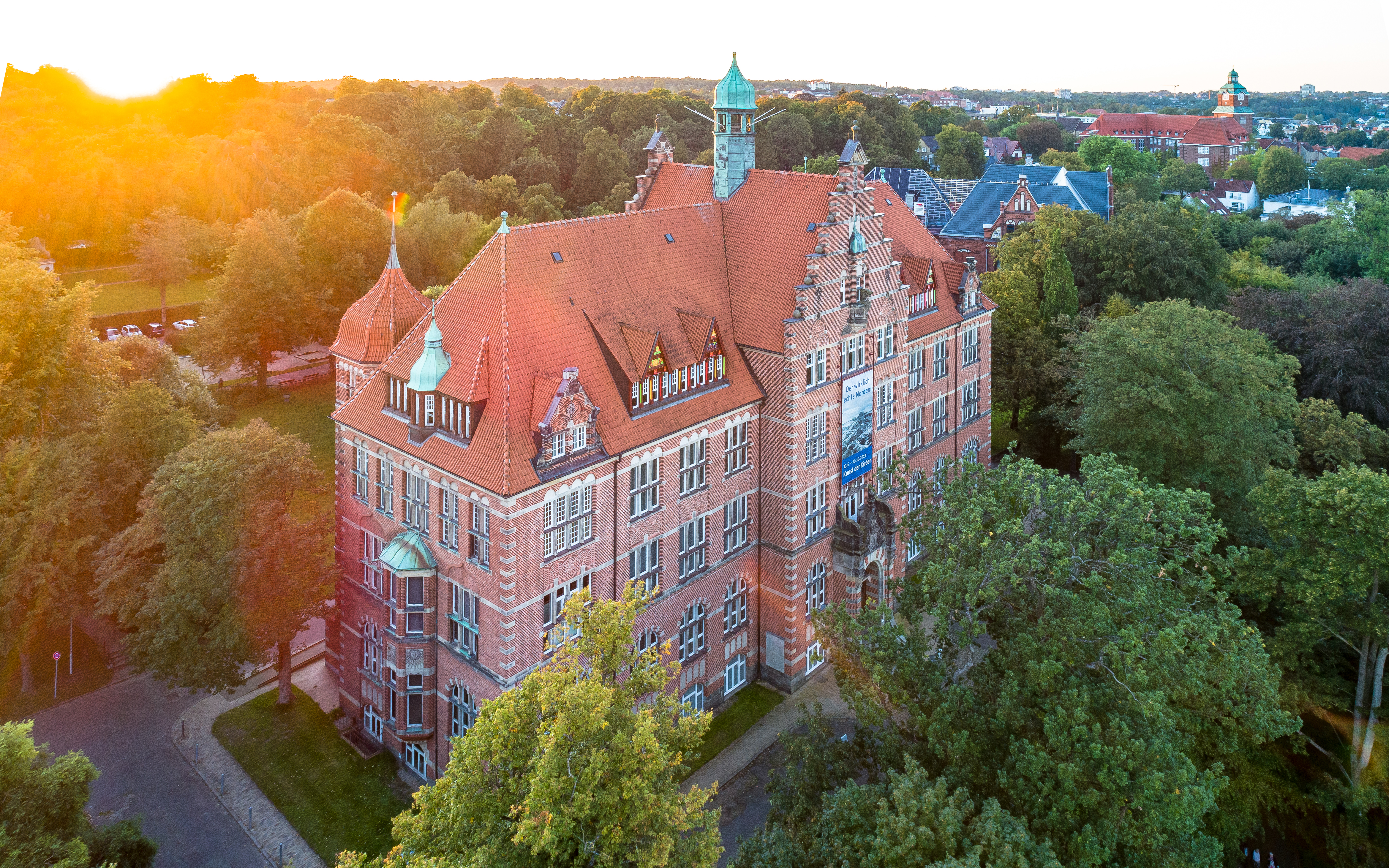 Das Heinrich-Sauermann-Haus des Museumsbergs Flensburg, dahinter das Hans-Christiansen-Haus und hinter diesem das Alte Gymnasium.